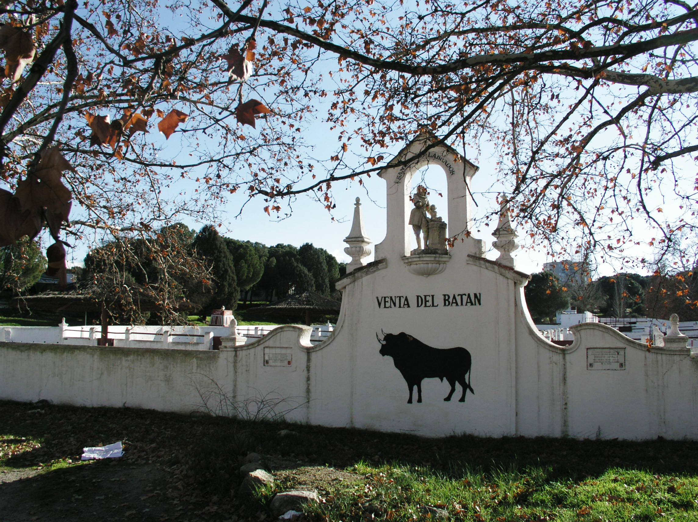 Casa de Campo, Madrid, Spain. Venta del Batan.